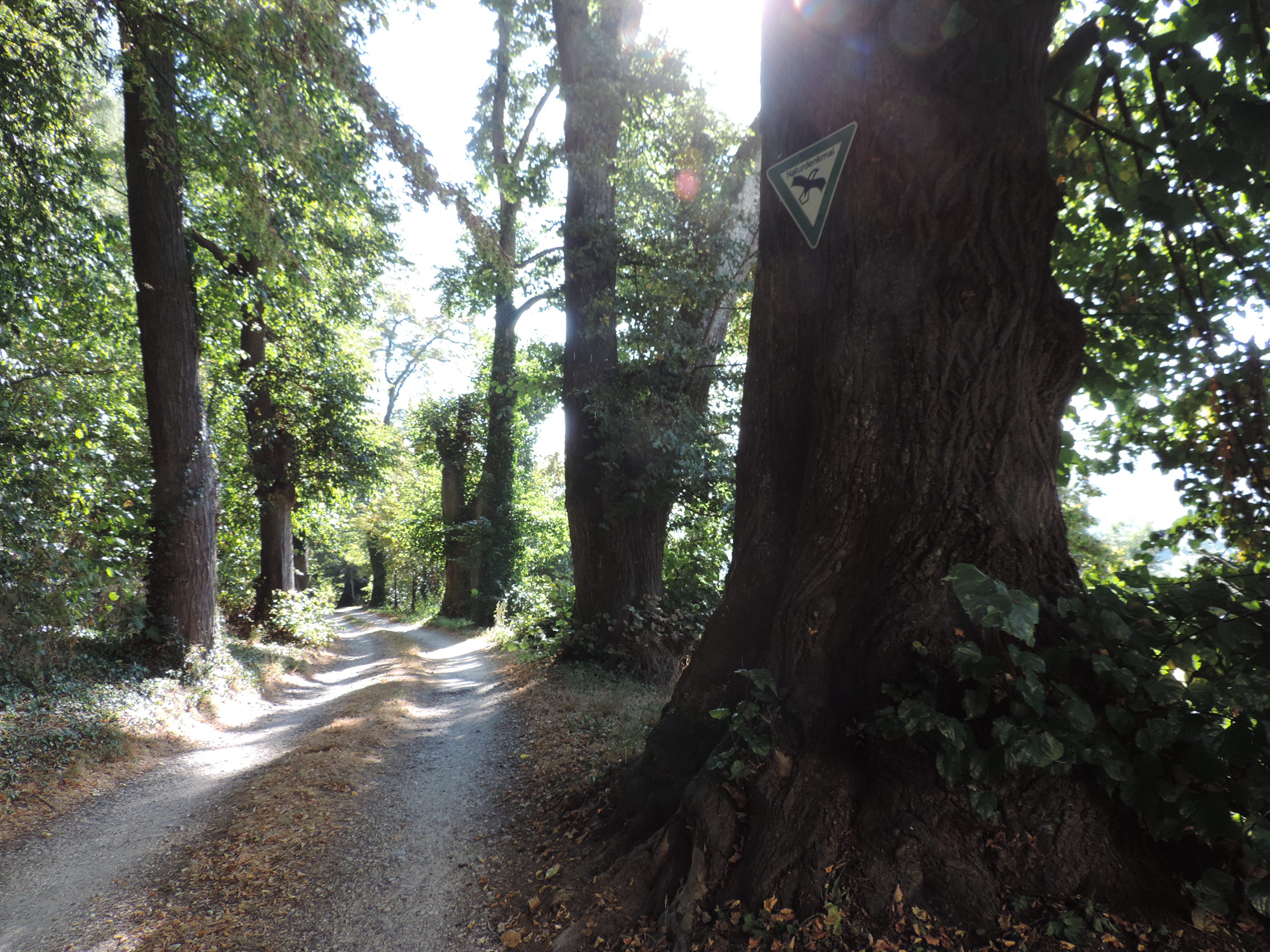 Lindenallee am Schlossberg in Neuburg an der Kammel